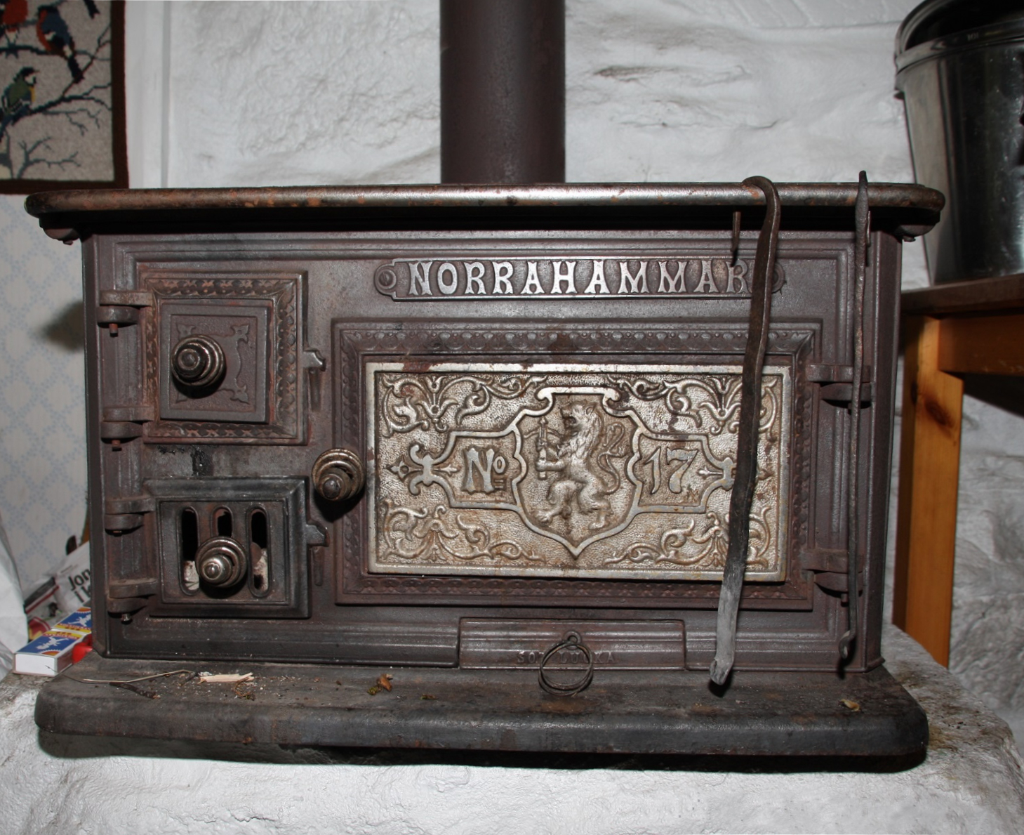 Spisel från Norrahammar installerad i ett torp i Bohuslän.